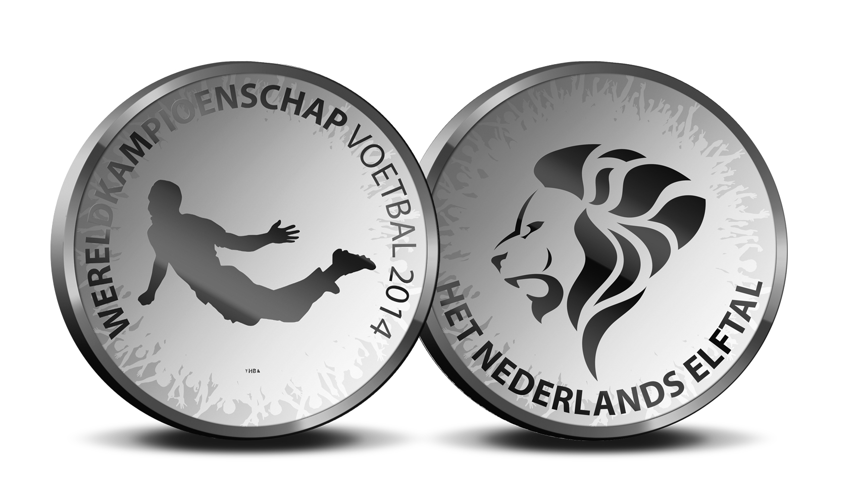 Ontwerp van herdenkingsmunt 'WK Oranje Penning', een officiële uitgifte ter ere van het WK voetbal in Brazilië.